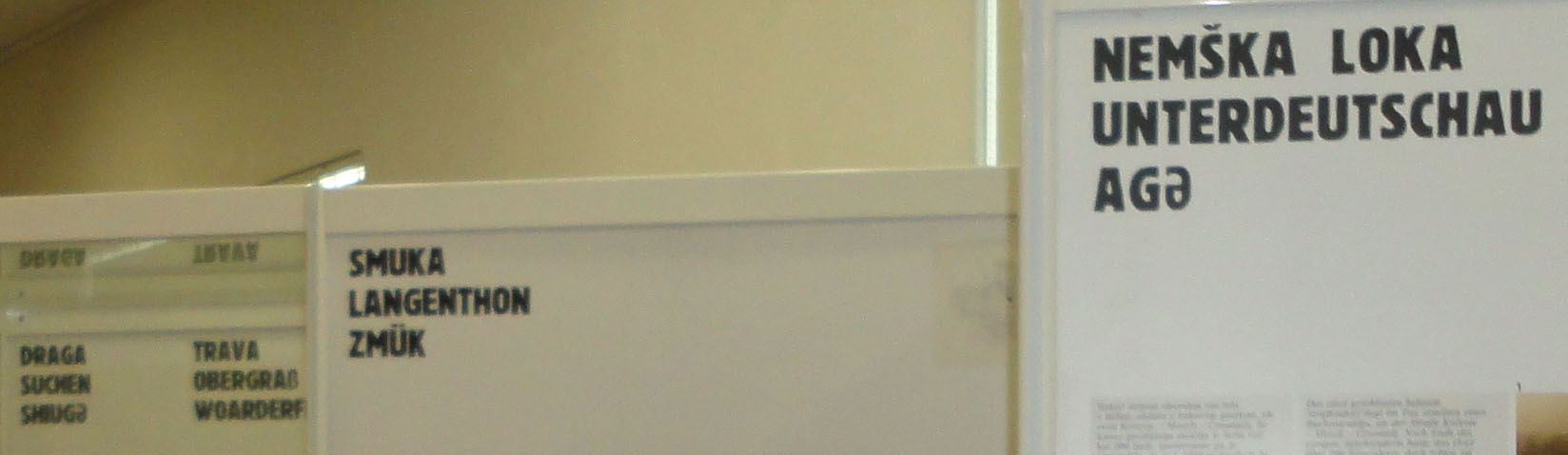 Krajevna imena na Kočevskem v slovenščini, nemščini in kočevarščini